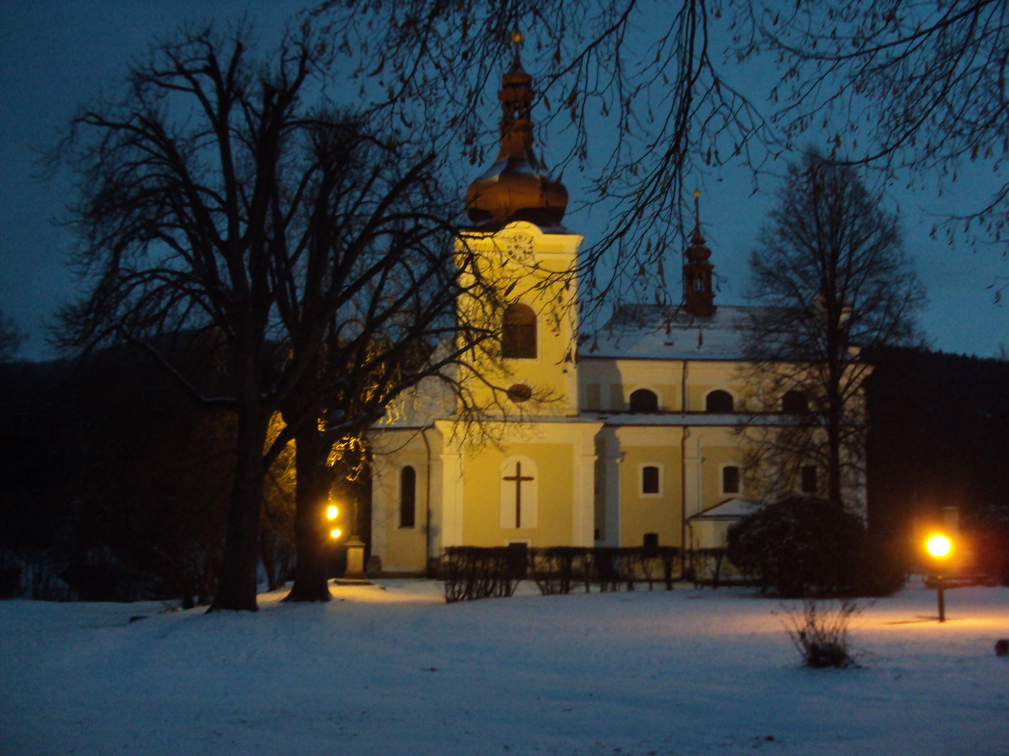 Kostel ve Sloupu v Čechách